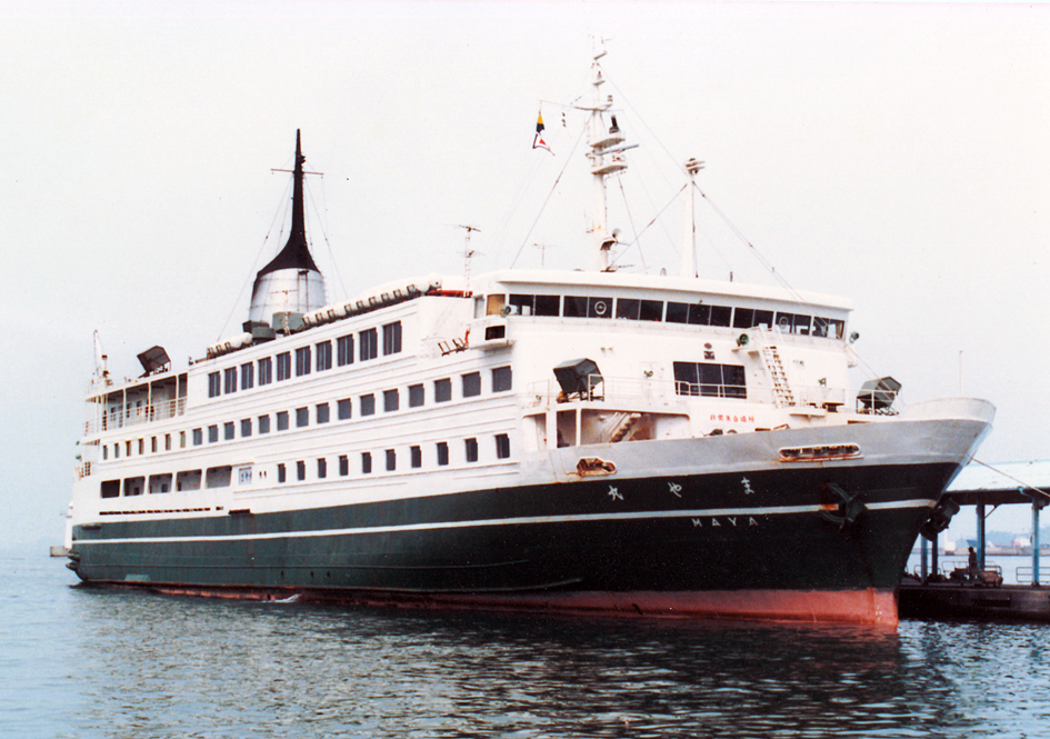 関西汽船 まや丸